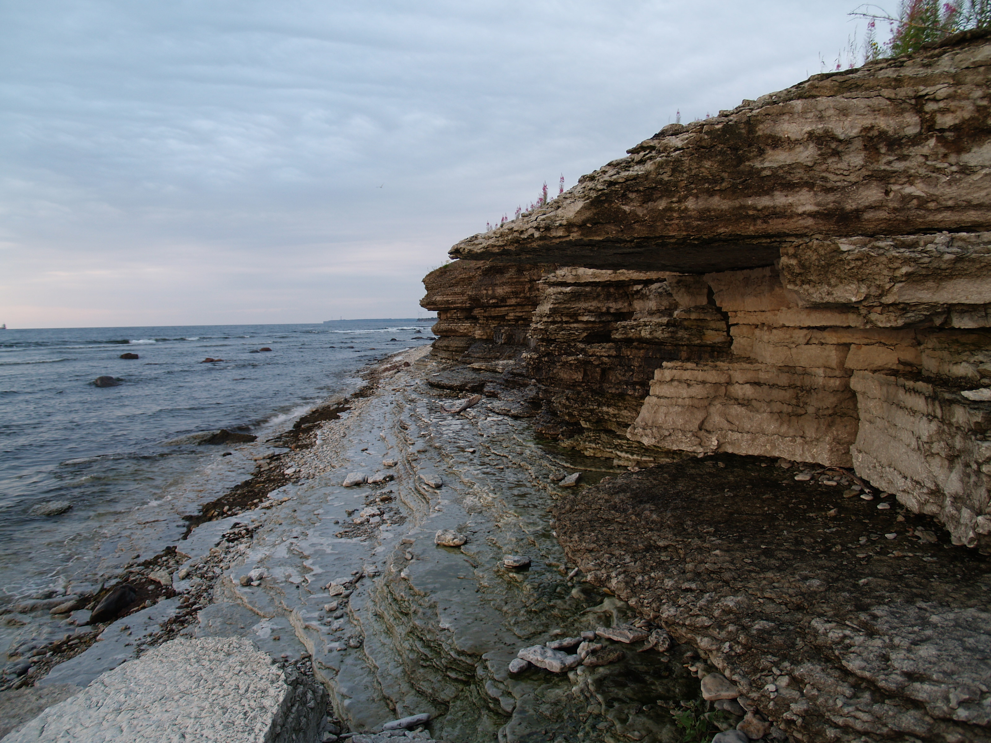 Suur-Pakri pank